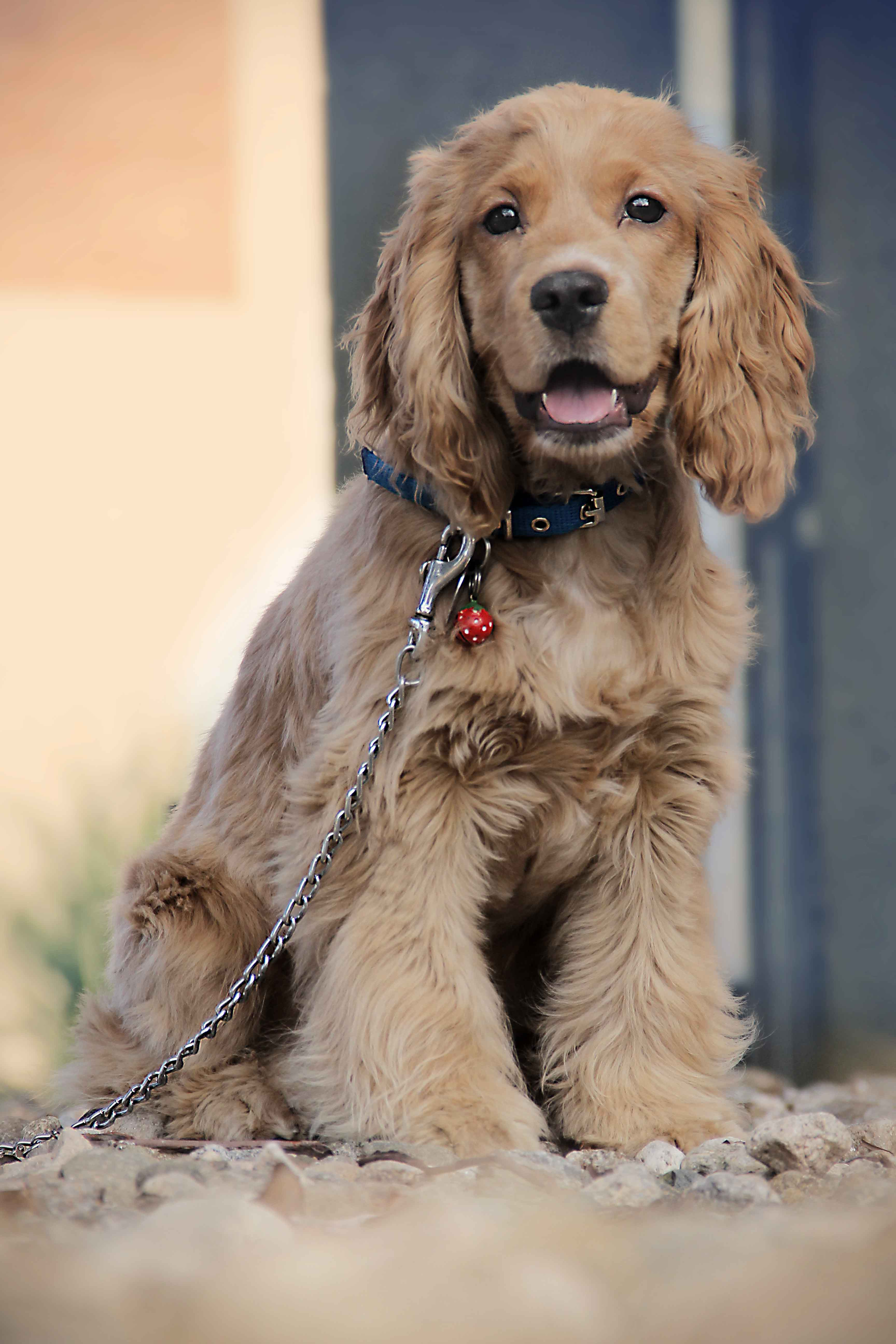 Cocker Spaniel inglés dorado de 2 años de edad